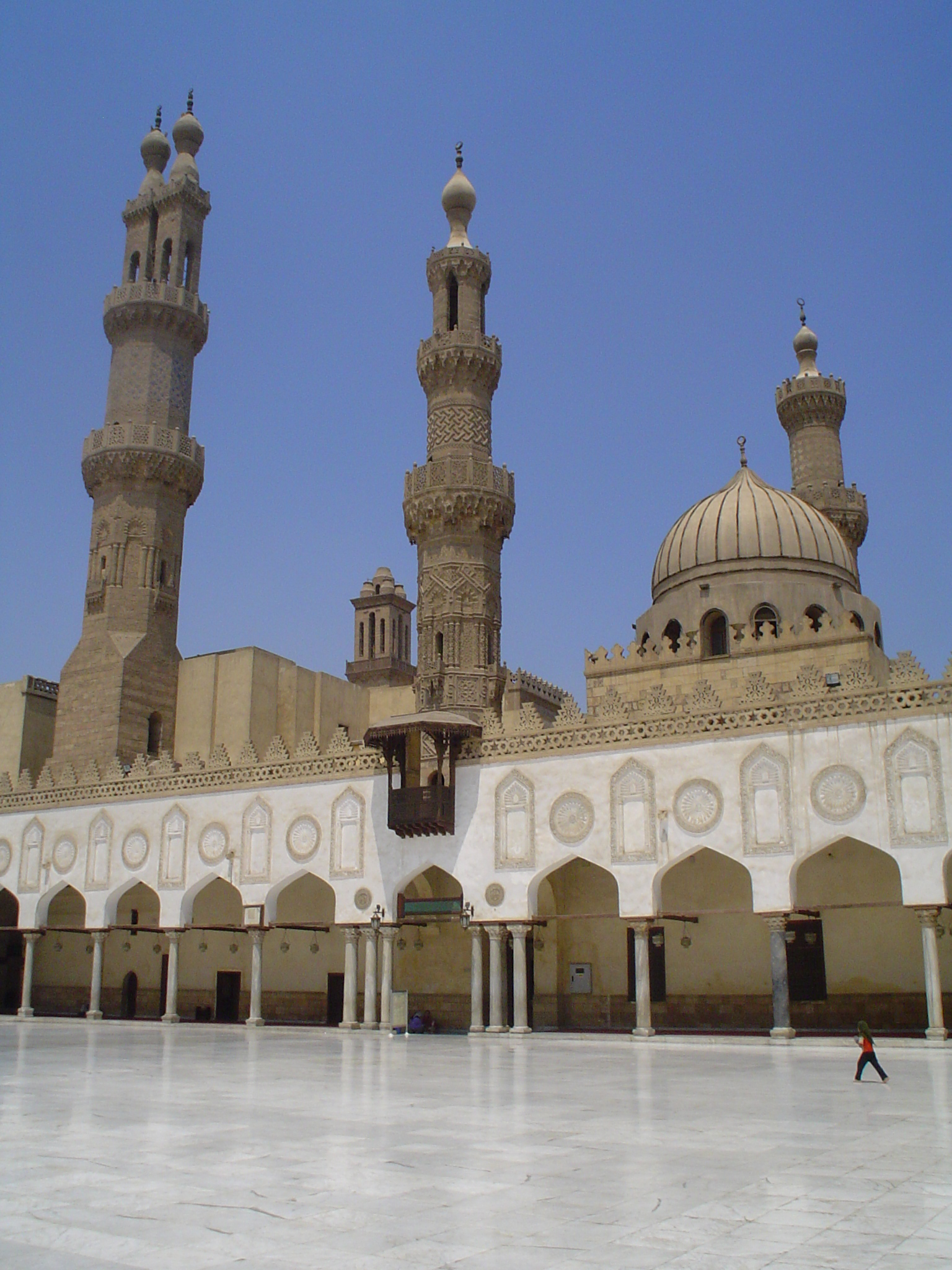 Inside Al-Azhar